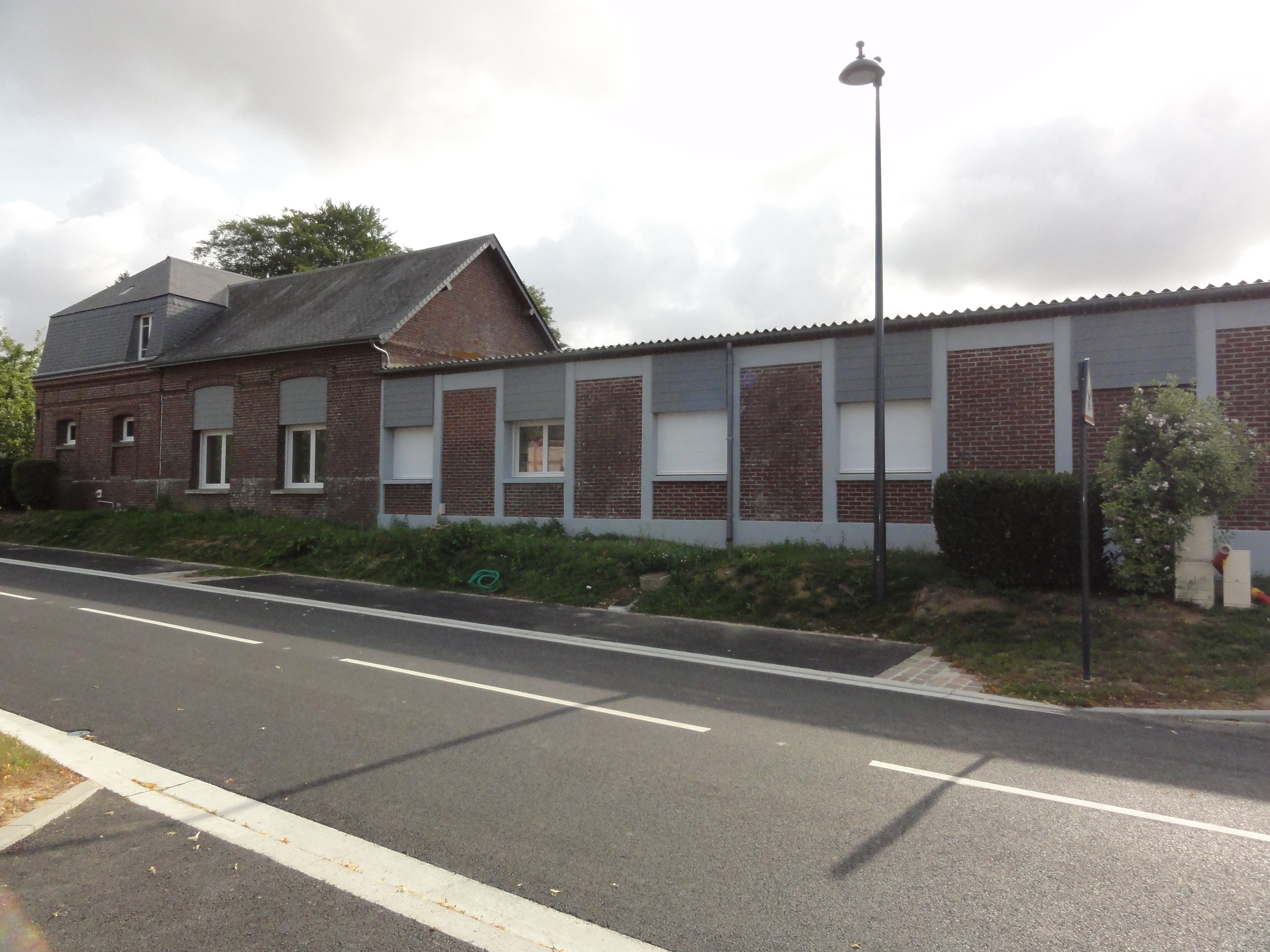 Écretteville-lès-Baons (Seine-Mar.) anciennes écoles